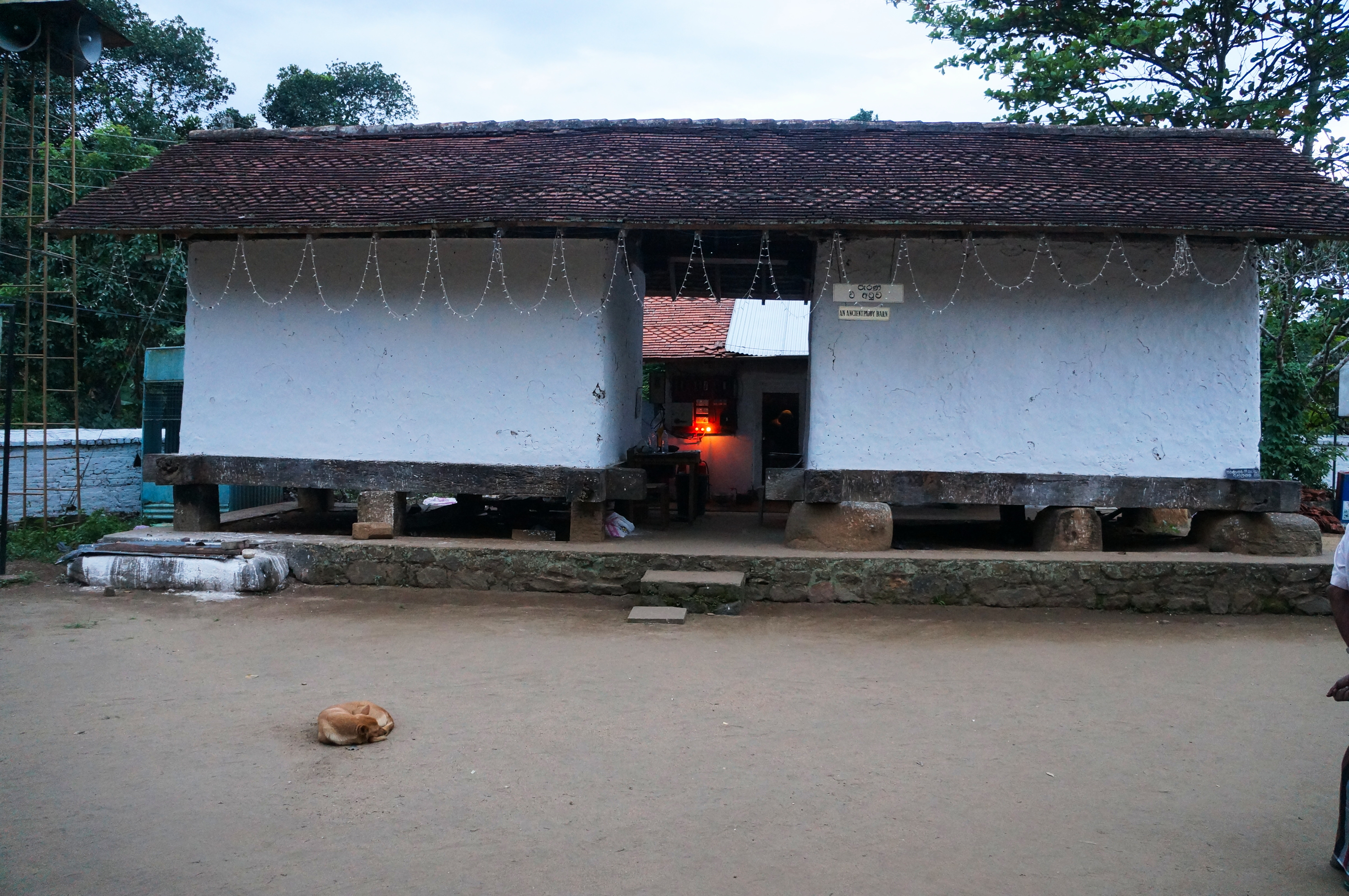 Le temple Embekka Devalaya à Kandy Sri Lanka.- Asie du Sud